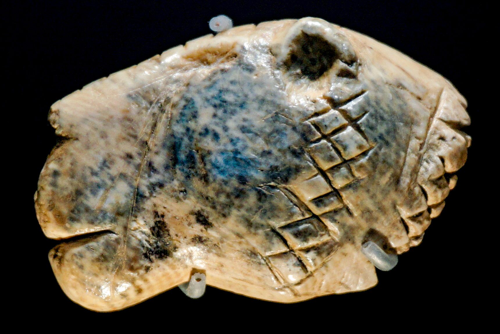 Löwenköpfchen, Mammutelfenbein, Vogelherdhöhle, Stetten ob Lonetal. Aurignacien, ca. 35.000 - 40.000 Jahre alt